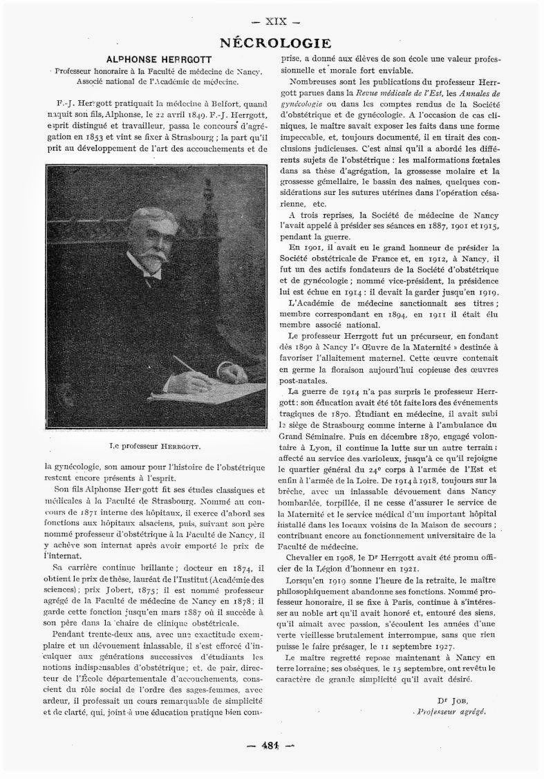 Dr Job : " Nécrologie. Alexandre Herrgott", Paris médical, 1927, n° 66, p. 481